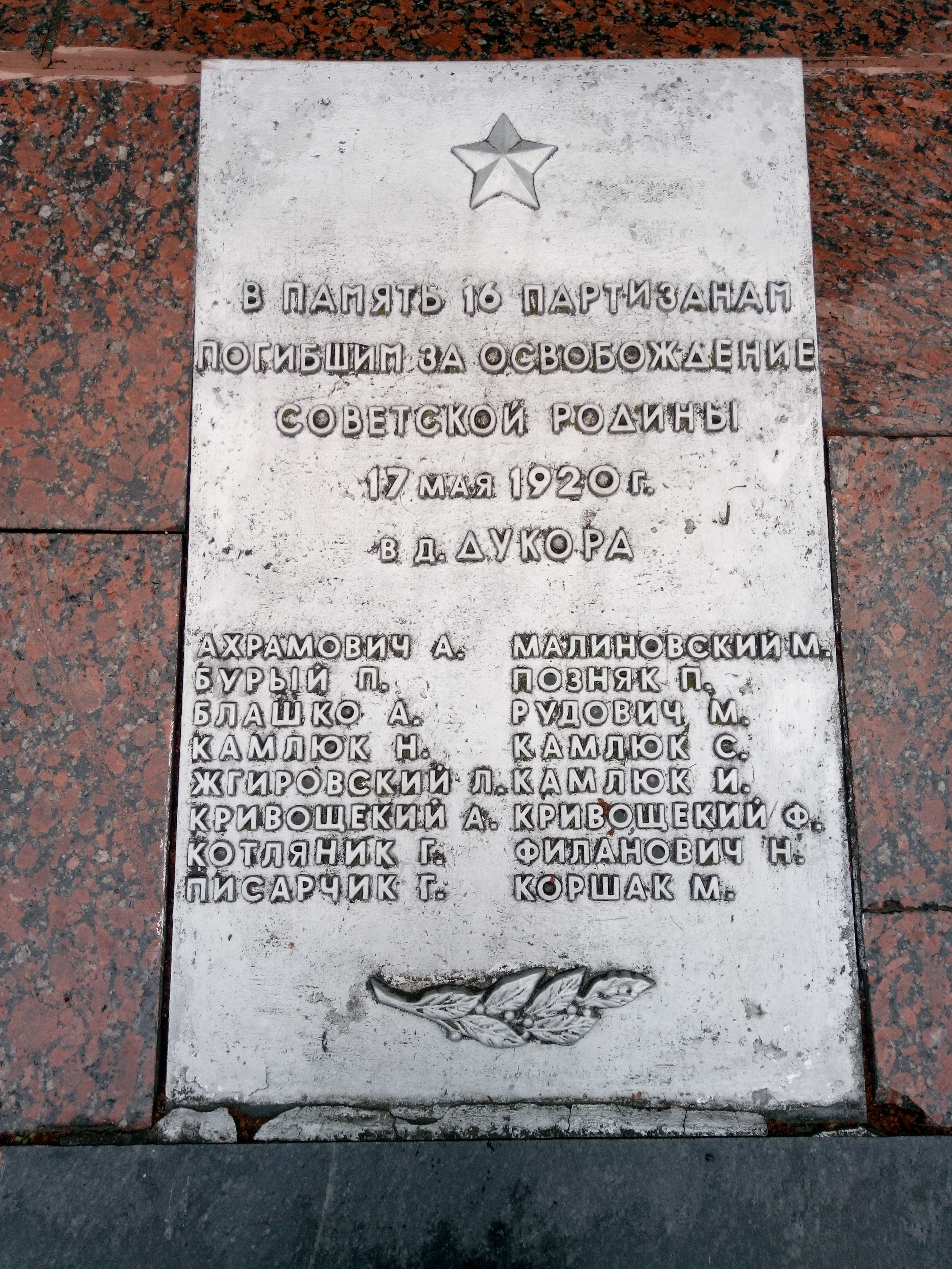 Таблічка ў памяць аб загінулым дукорскіх партызан.